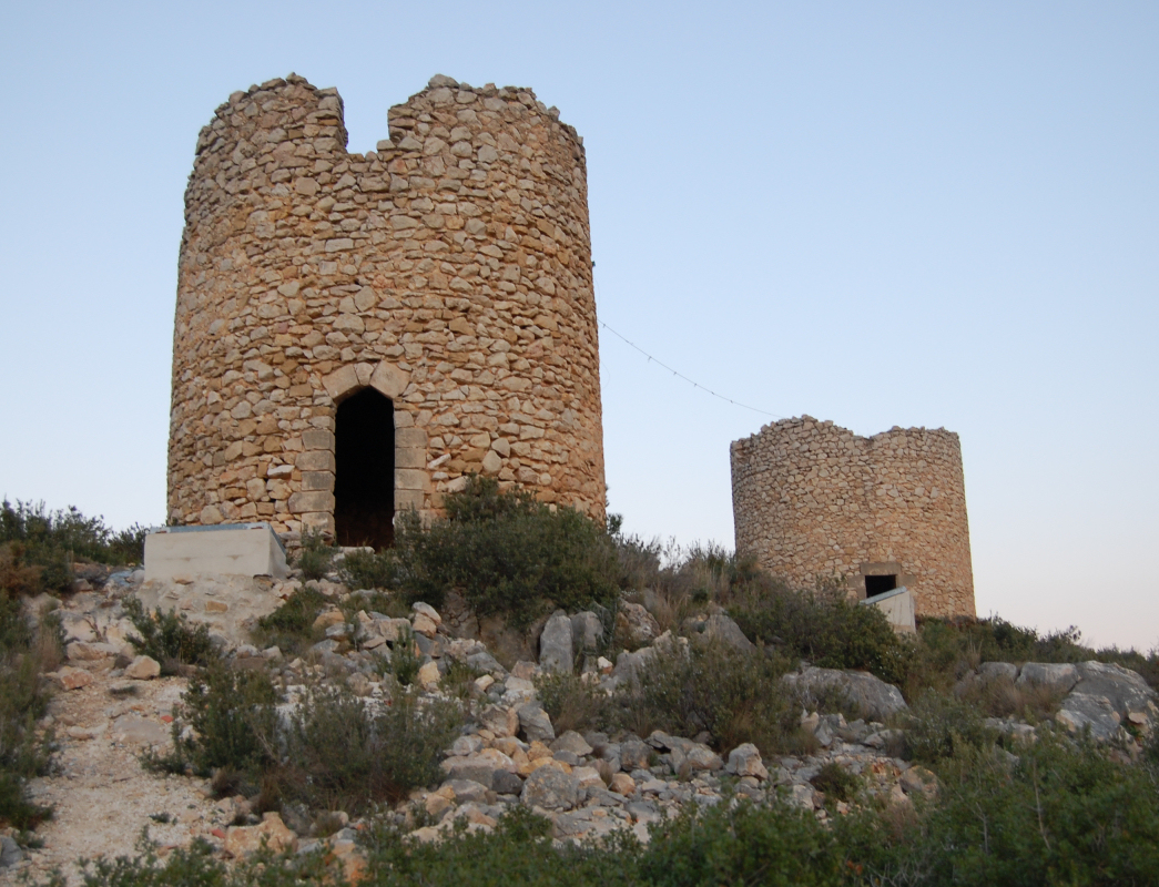 Molinets de Pedreguer (Marina Alta). Construïts al voltant de 1850, eren utilitzats per a moldre el gra i convertir-lo en farina aprofitant la força del vent.